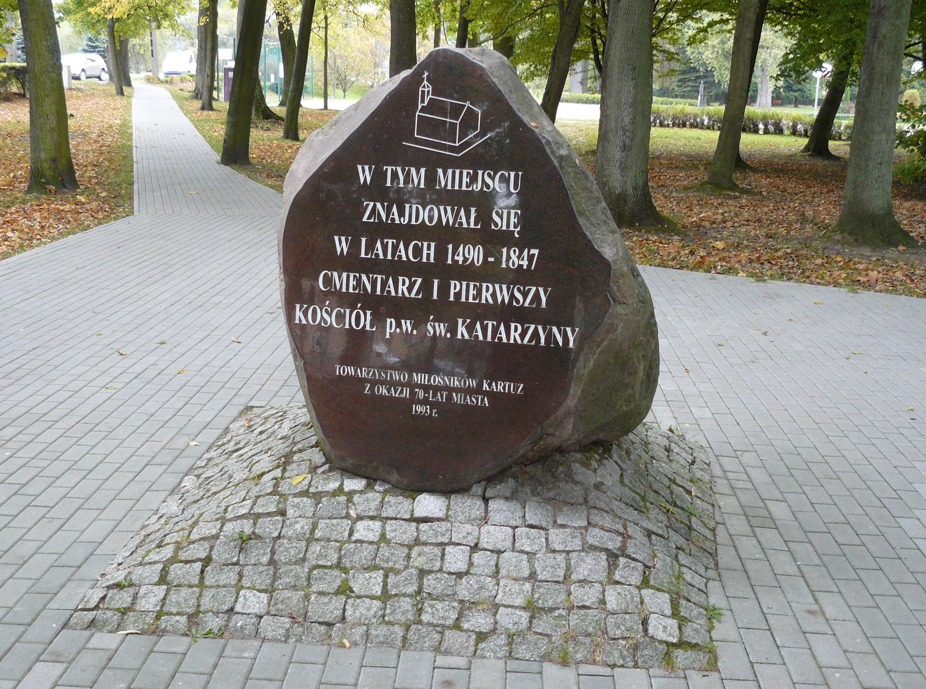 Kartuzy.